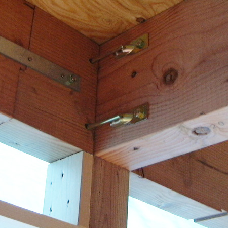 羽子板ボルトM12 02